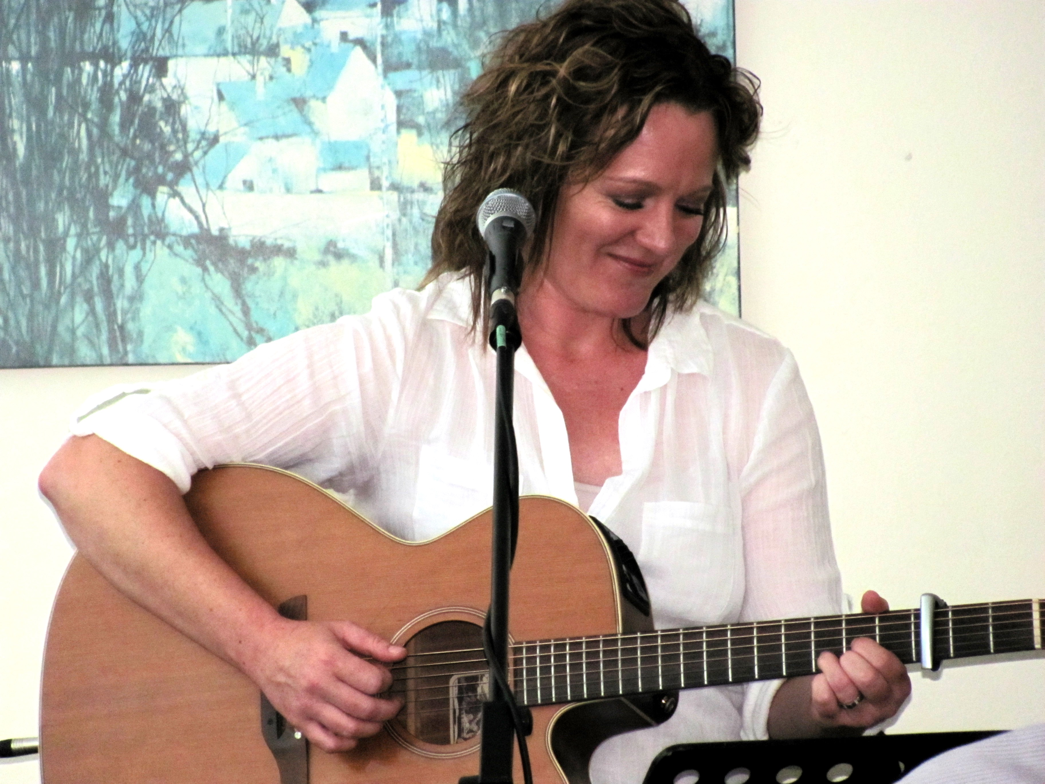 Lize Beekman